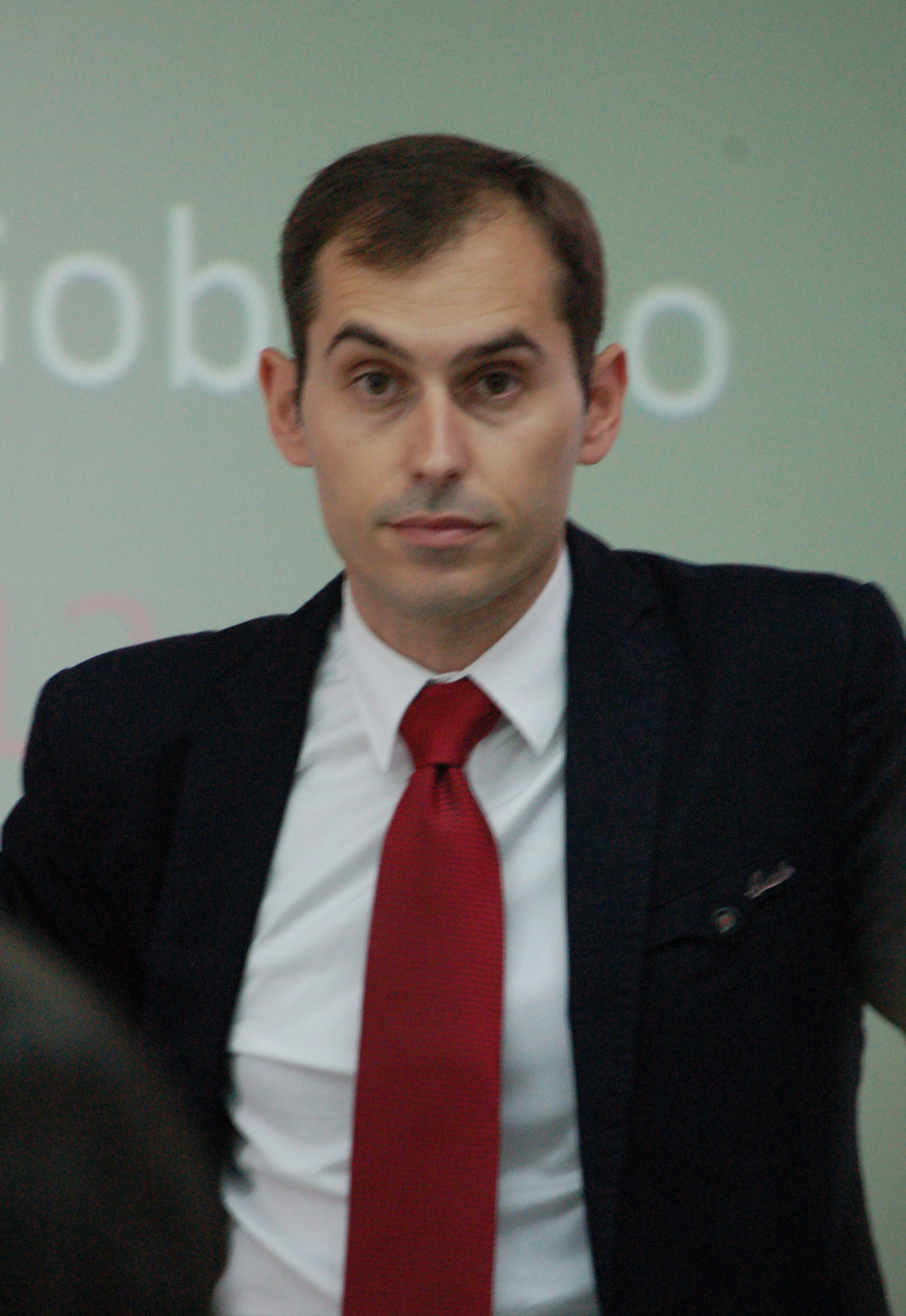 José María Cancela Carral, ex-decano da Facultade de Ciencias da Educación e do Deporte de Pontevedra